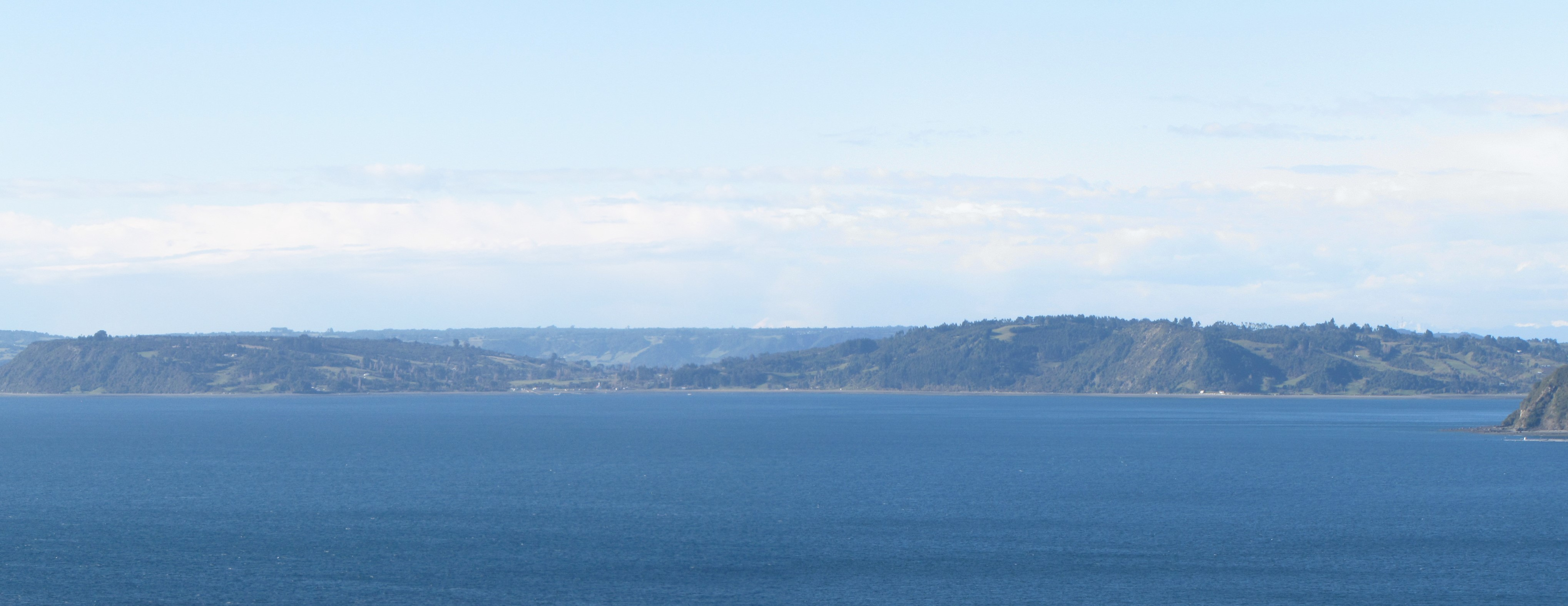 La isla Linlín vista desde el mirador del Alto de la Paloma, Quinchao, Chile.